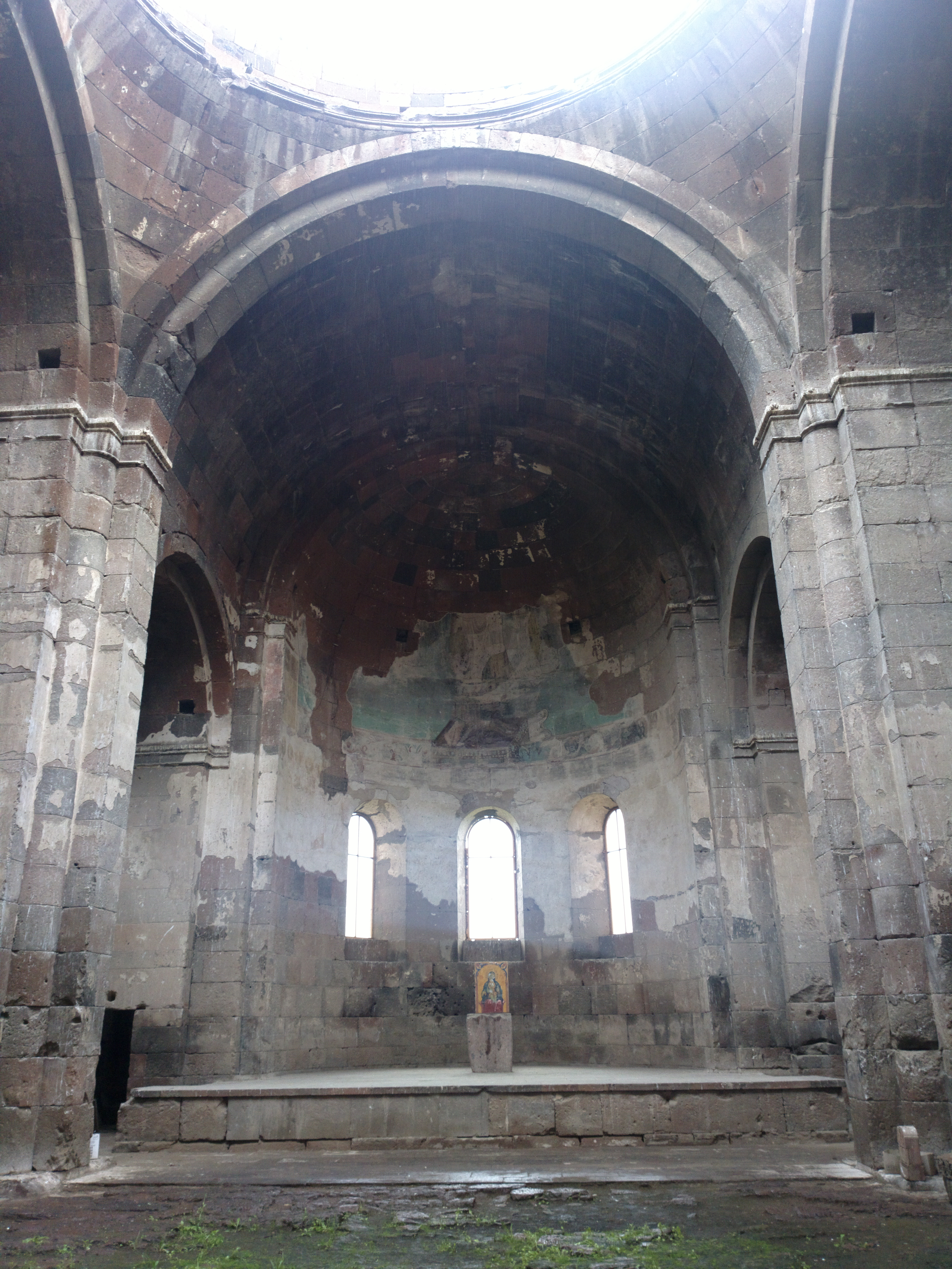 Եկեղեցական համալիր Սբ. Գրիգոր (Արուճի Կաթողիկե) 22/8